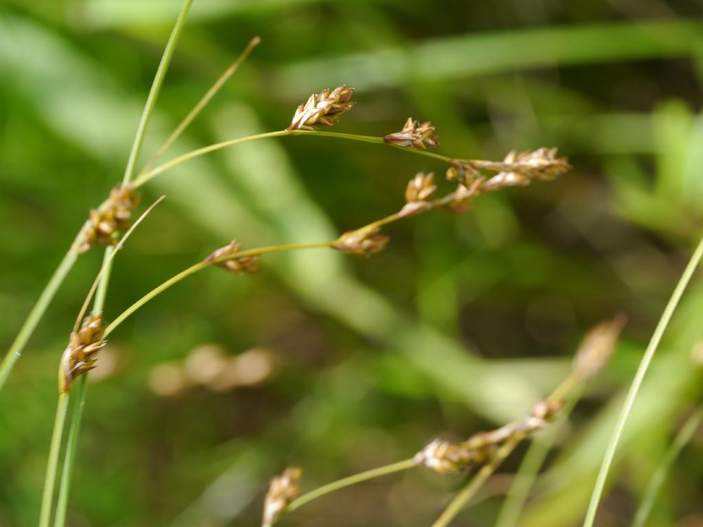 2018/06/24 霧多布湿原・北海道：Hokkaido, Japan